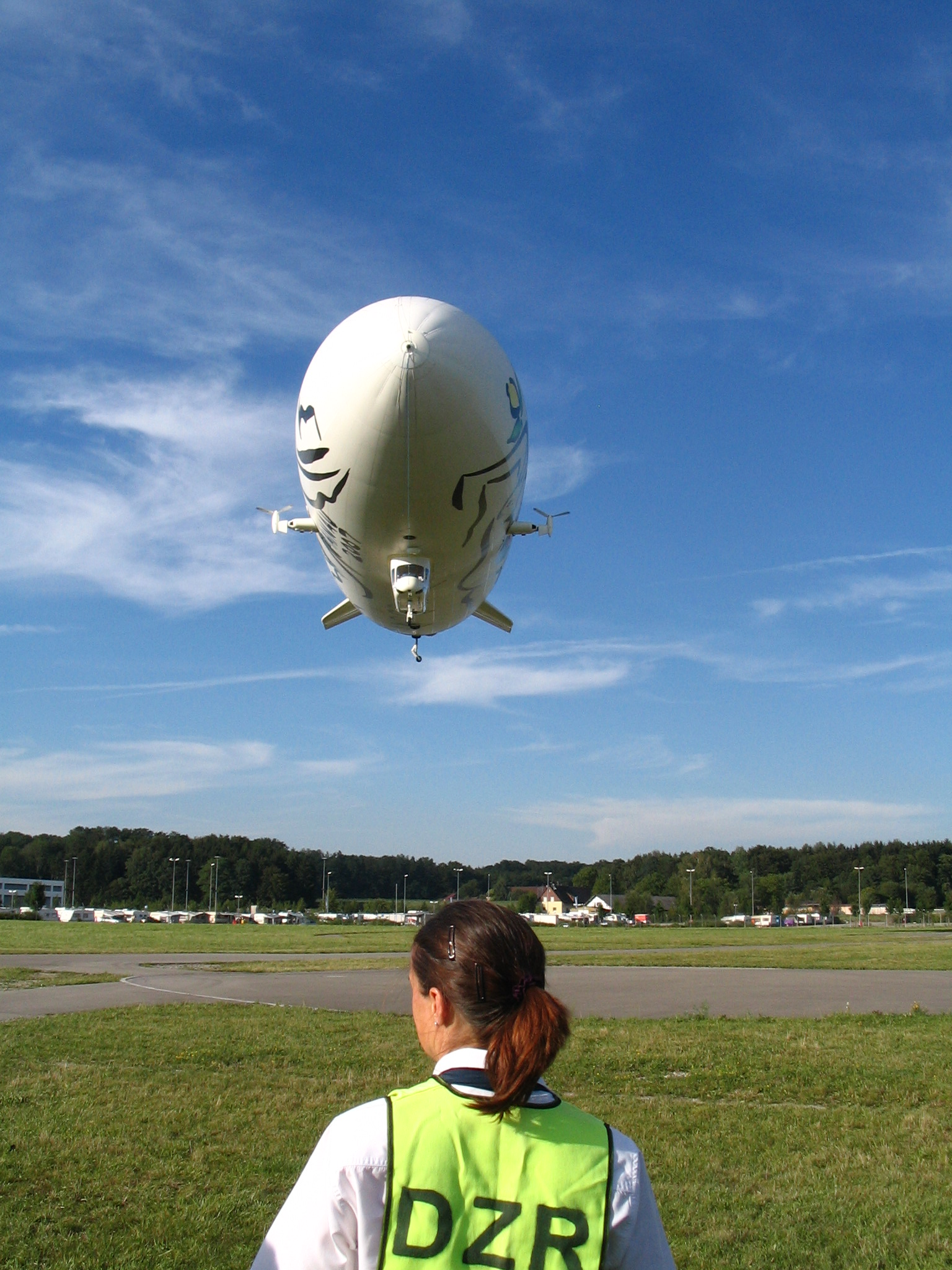 Zeppelin NT (D-LZZF): Landung in Friedrichshafen